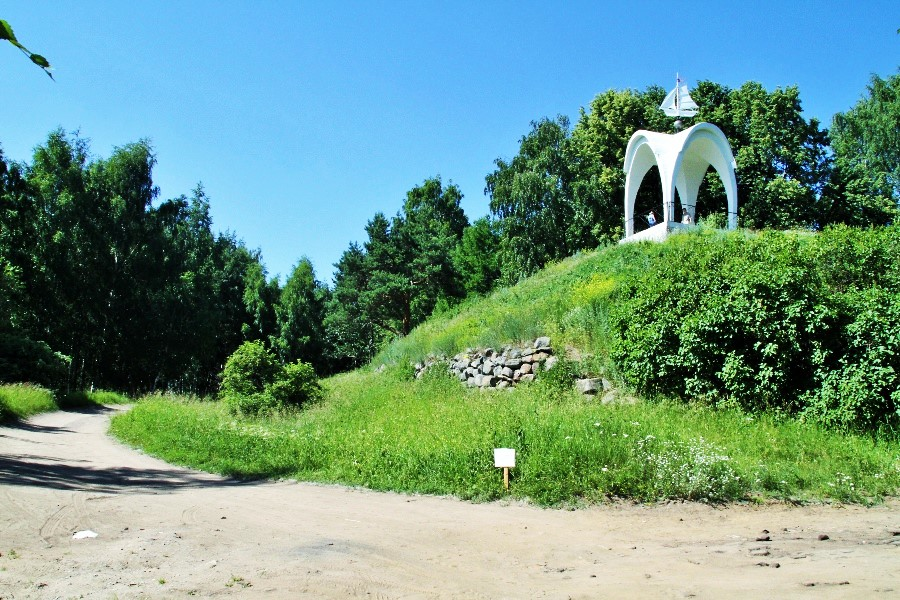 Петровский городской парк: Петровсий парк расположен на левом берегу реки Волги в границах города Рыбинска. Северная граница парка проходит по ул. Коллективной, западная граница парка проходит по ул. Штурвальной, восточная граница парка проходит по естественной опушке парковых насаждений, южная граница парка проходит по берегу реки Волги и ул. Свердлова, Рыбинск, Рыбинский район, Ярославская область This image is related to the protected area of Russia number 7610341